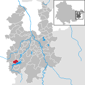 Zadelsdorf in Thuringia - District Greiz